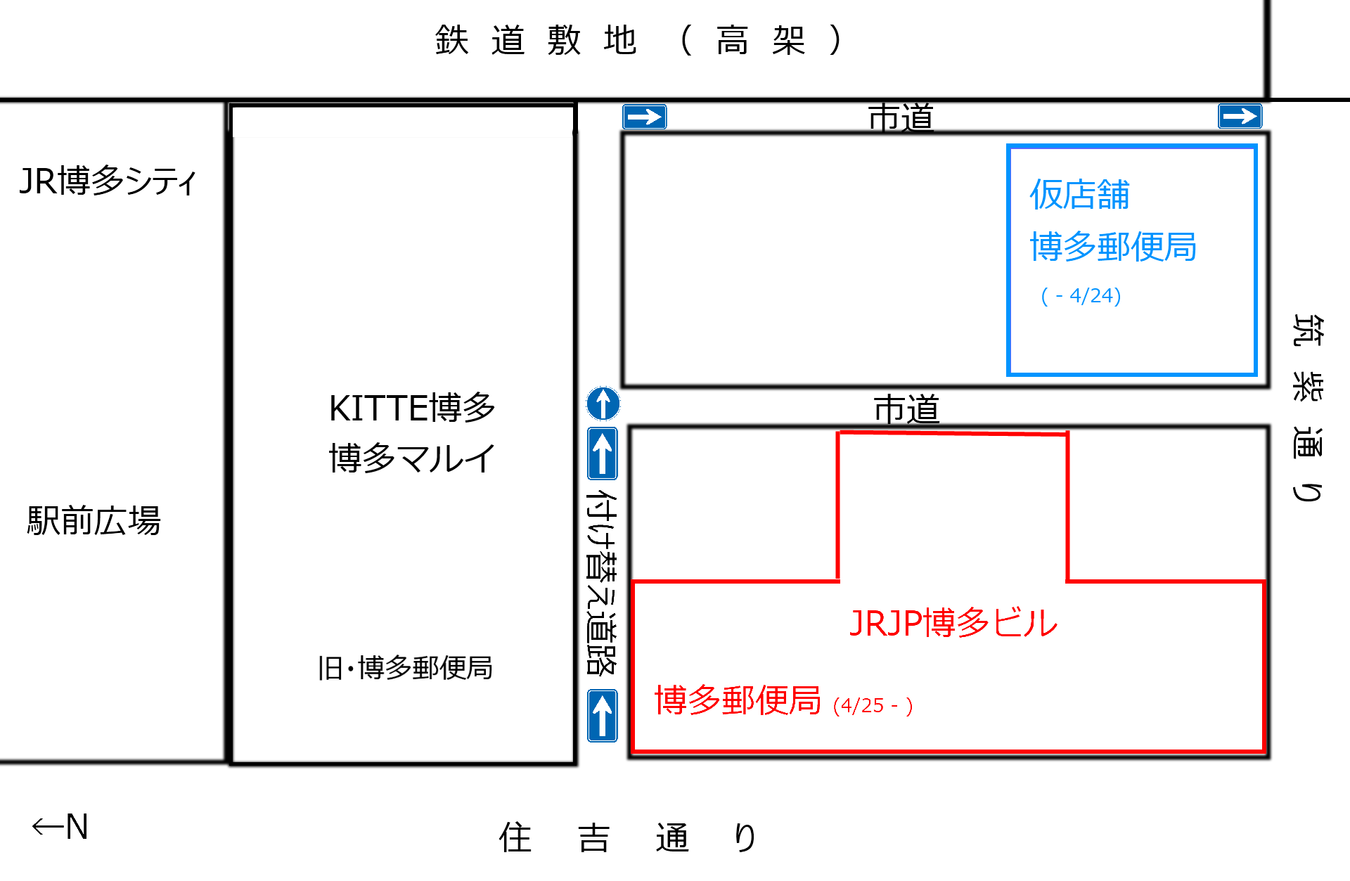 博多郵便局移転図(2016年)